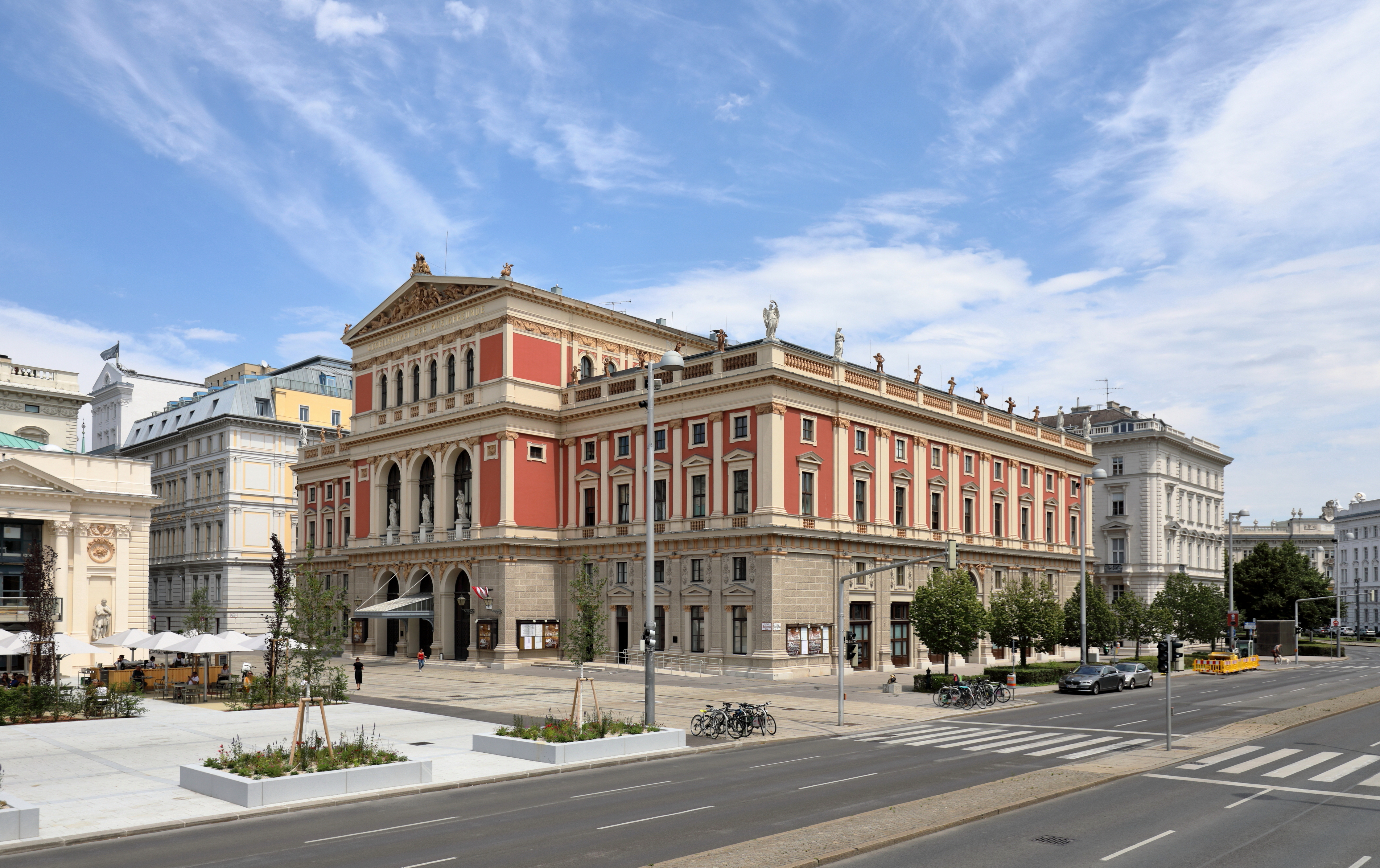 Südwestansicht des Wiener Musikvereinsgebäude an der Adresse Karlsplatz Nr. 6 / Wiener Musikvereinsplatz Nr. 1 im 1. Wiener Gemeindebezirk Innere Stadt.Das Gebäude mit zwei großen Konzertsälen und im Stil der „hellenistischen Renaissance" wurde nach Plänen des Architekten Theophil Hansen ab 1867 errichtet und am 6. Jänner 1870 mit einem feierlichen Konzert eröffnet. Anfang der 2000er-Jahre wurde das Gebäude unterirdisch in Richtung Künstlerhaus nach Plänen von Wilhelm Holzbauer um rund 30 Millionen Euro erweitert. Am 20. März 2004 wurden die dabei vier errichtete Veranstaltungssäle für das Publikum geöffnet.